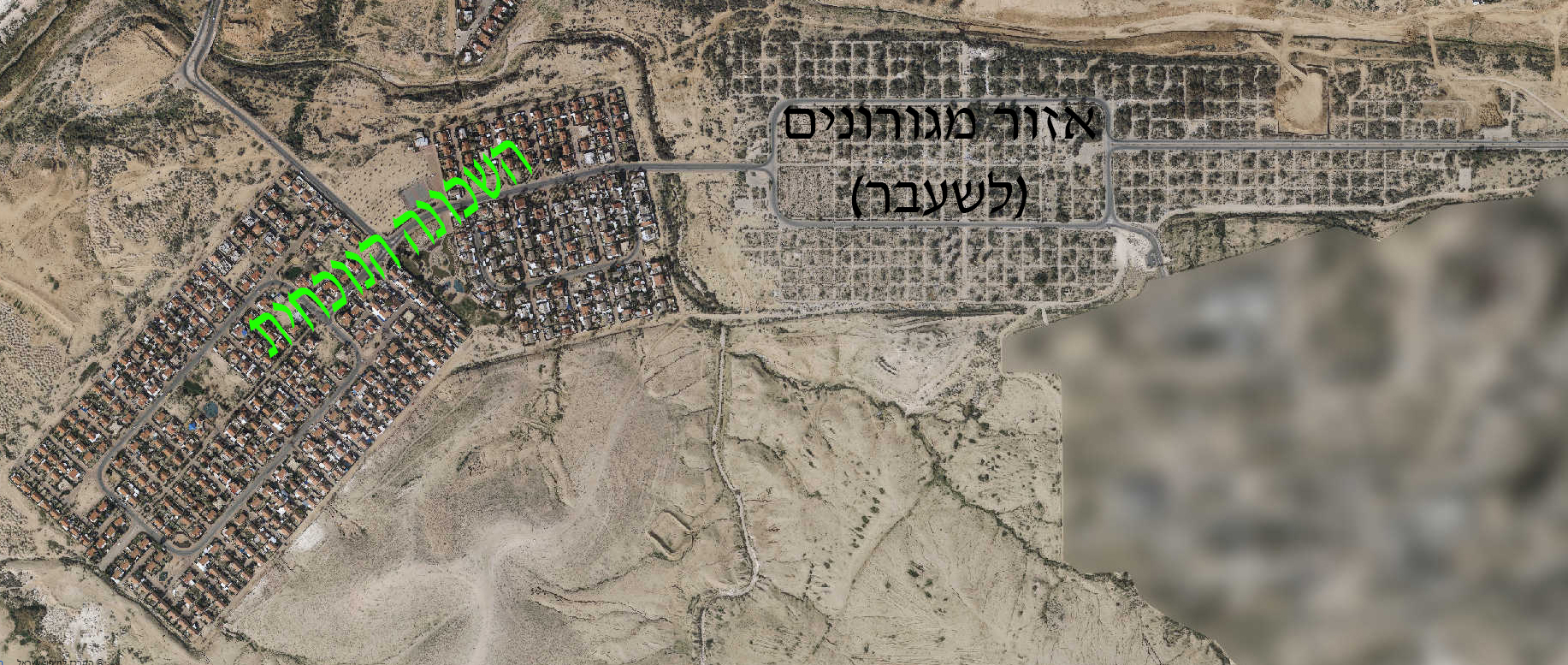 הסבר שכונת נחל בקע